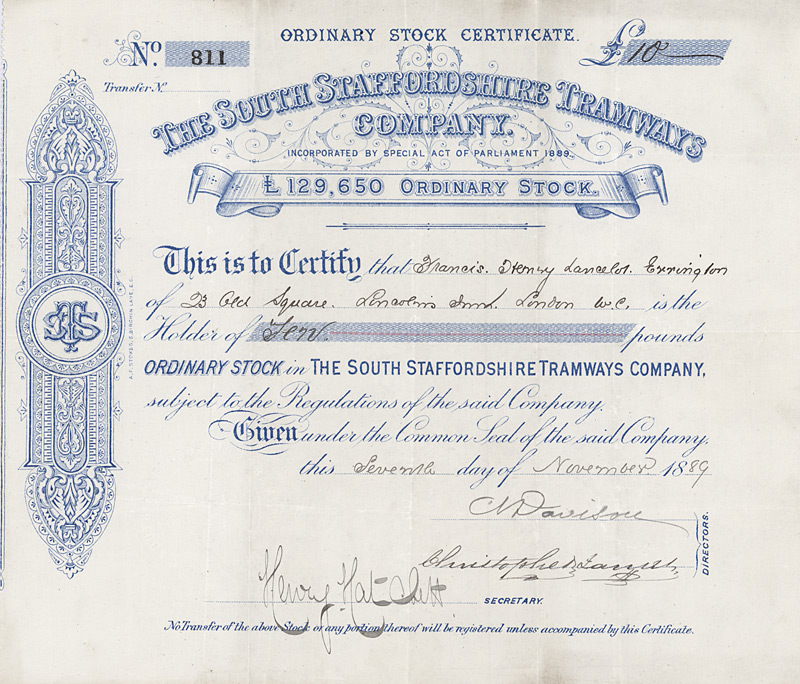 Stock of the South Staffordshire Tramways Company from the 7th November 1889